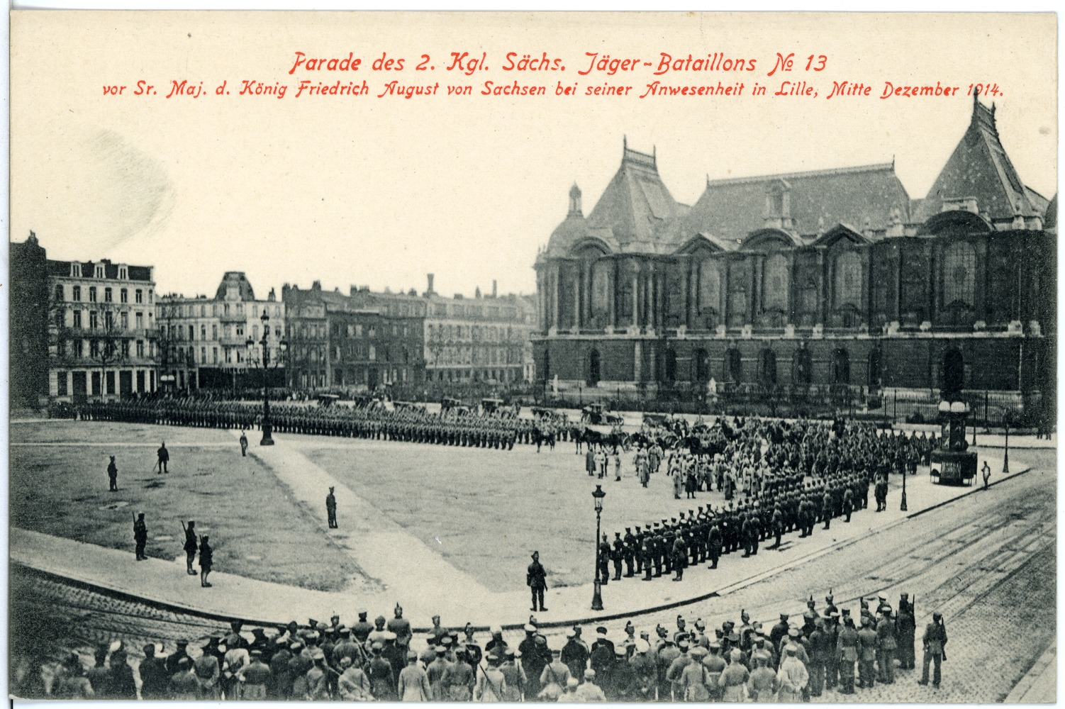 Lille (Frankreich - Département Nord ) — 2. Königlich Sächsisches Jäger-Bataillon Nr. 13 - Parade in Lille Dezember 1914